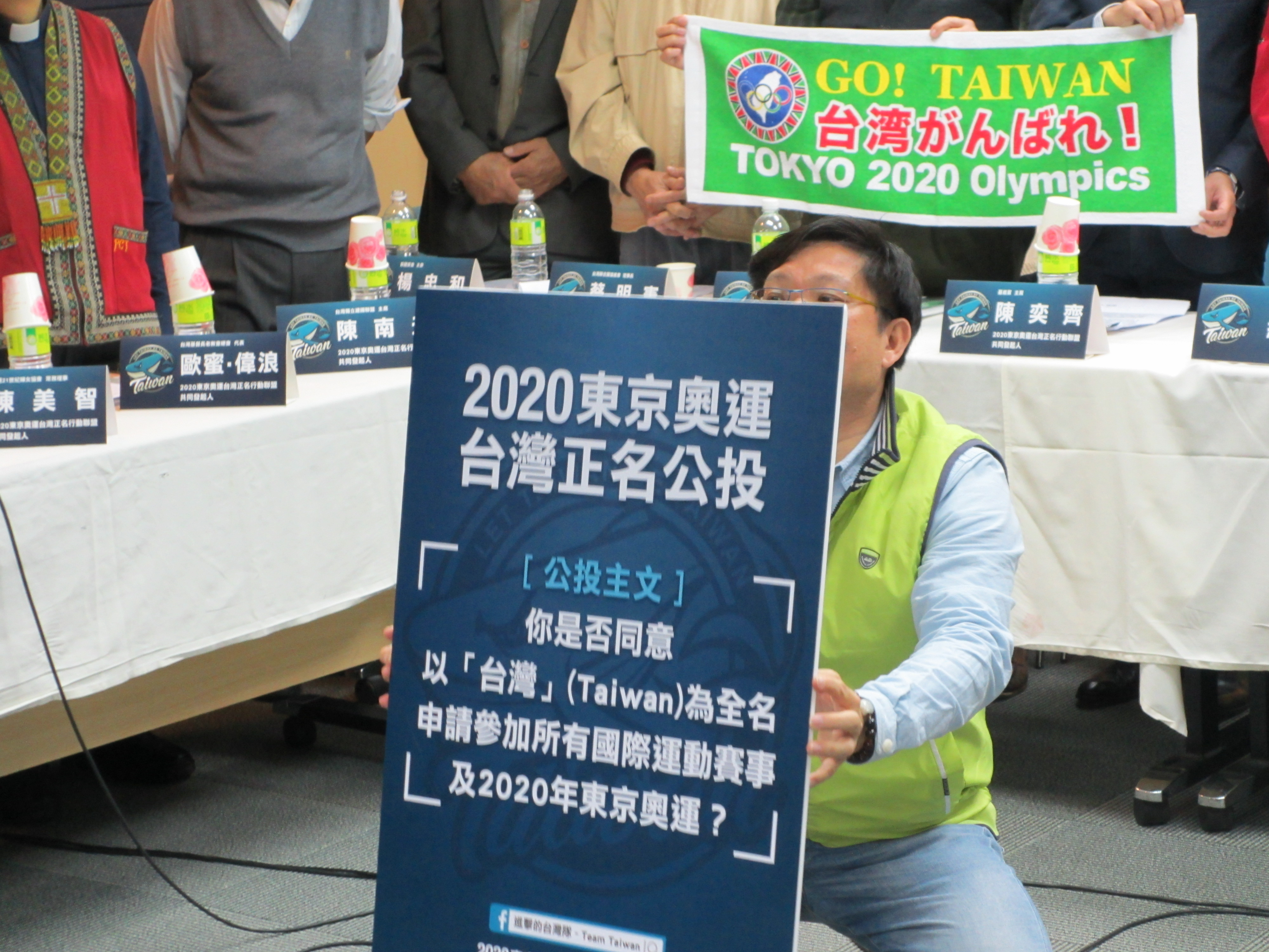 中文（台灣）: 2020東京奧運台灣正名行動聯盟舉辦記者會，宣傳2020年東京奧運台灣正名公投案。一人舉起「公投主文」展示在媒體面前。